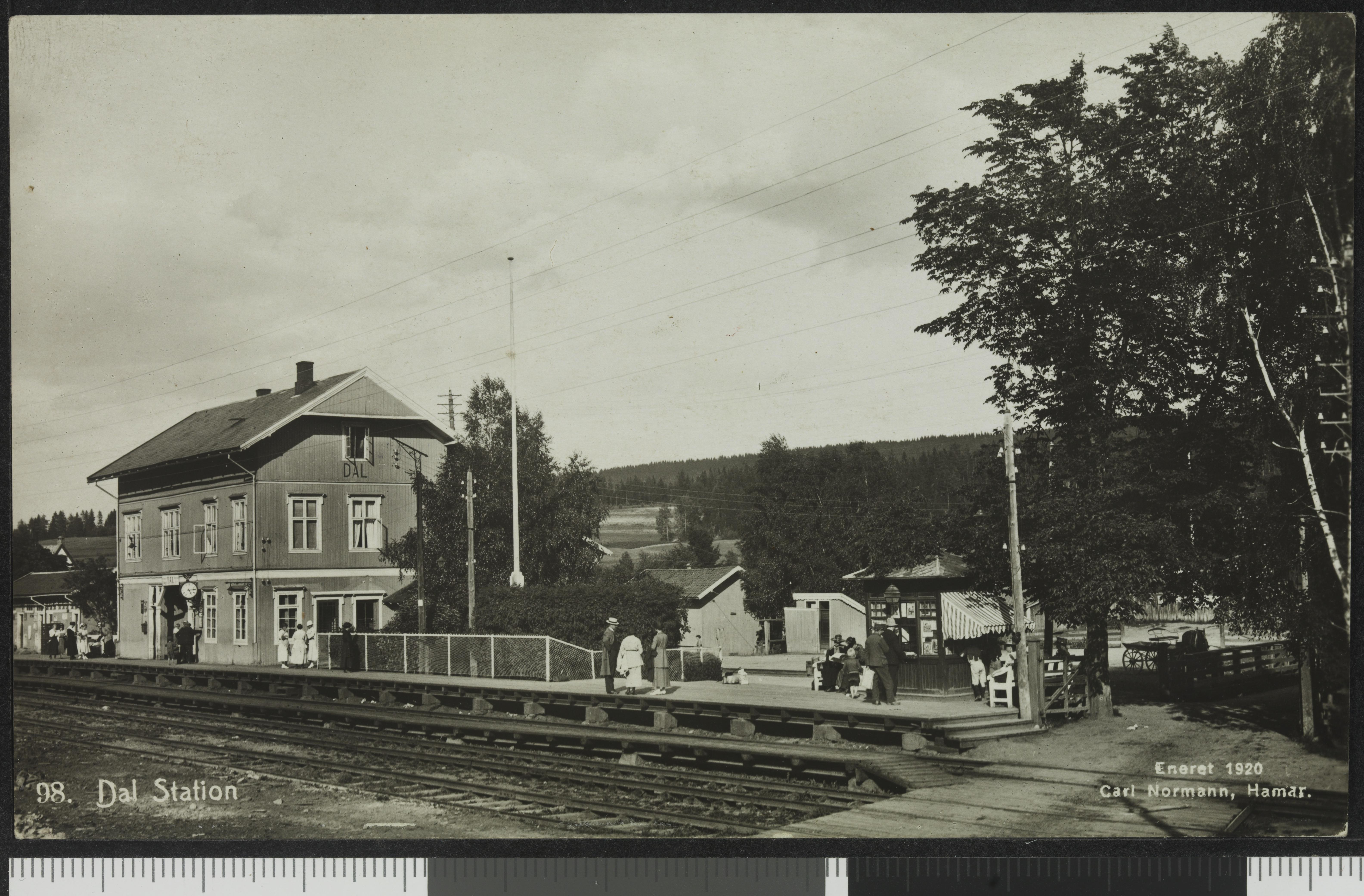 Bildet er hentet fra Nasjonalbibliotekets bildesamling Dal,Dal stasjon, Eidsvoll, Akershus